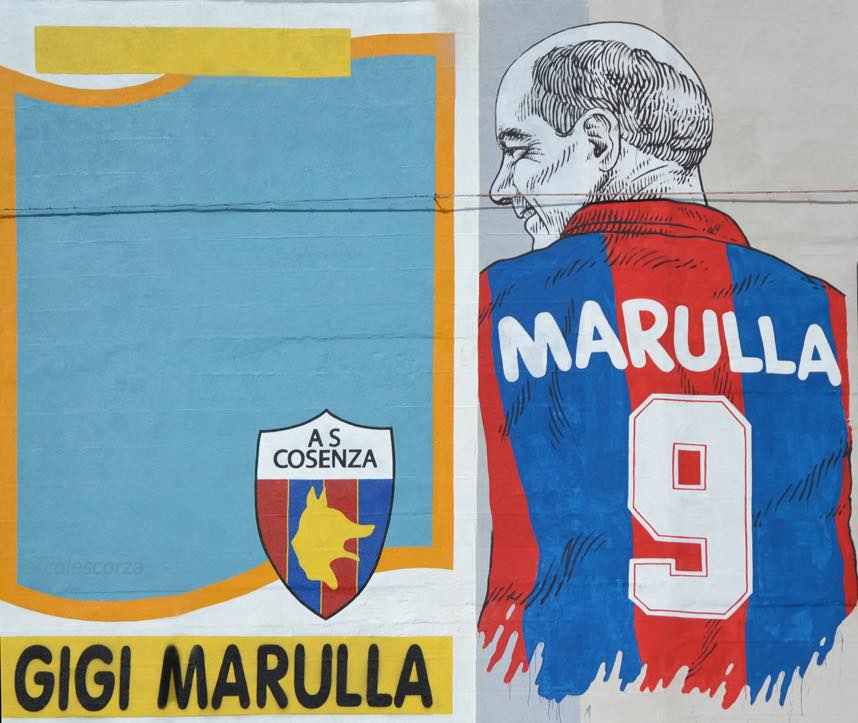 Murales degli artisti Favelli e Lucamaleonte dedicati a Gigi Marulla, indimenticata bandiera del Cosenza Calcio